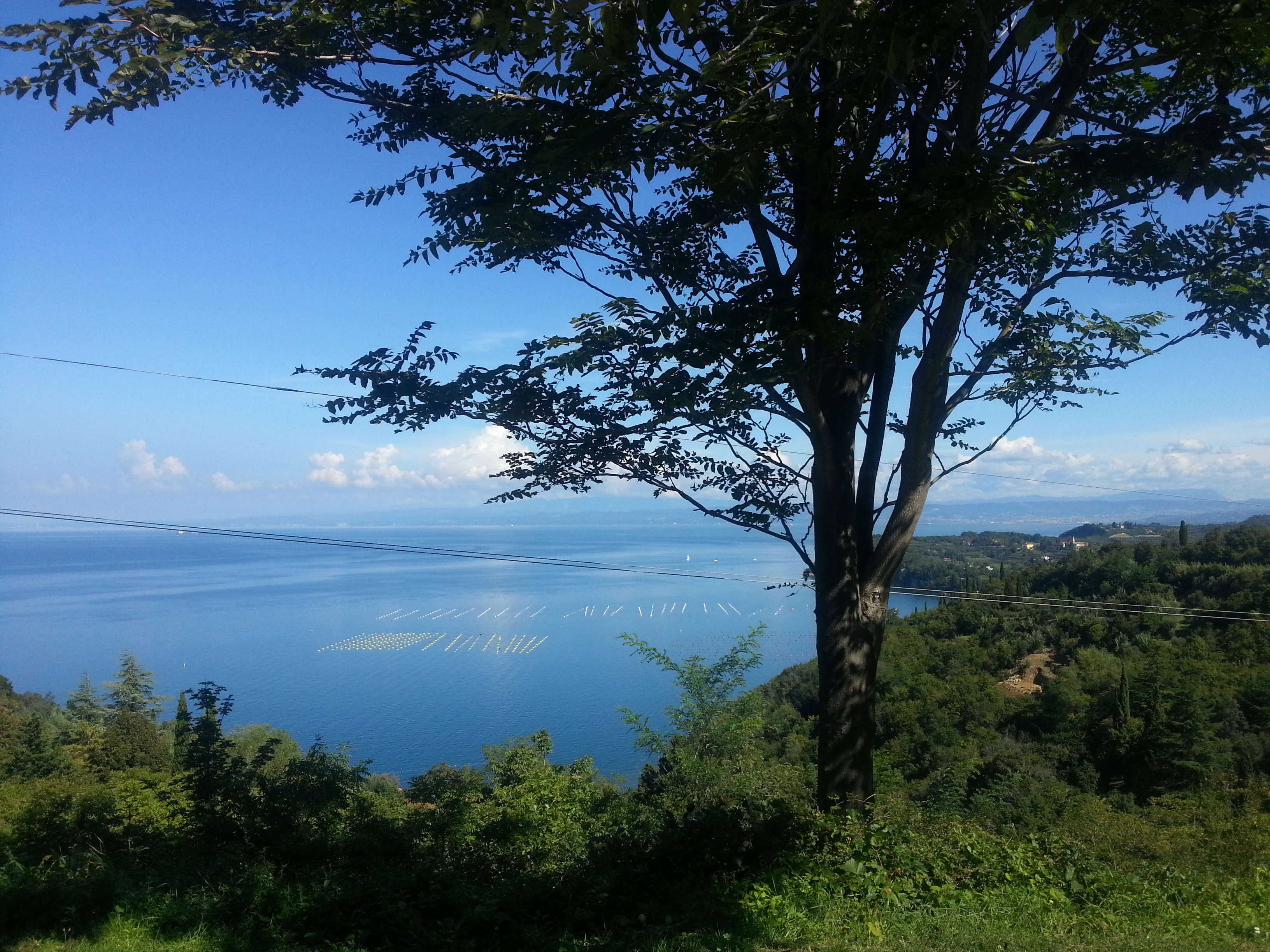 Strunjan